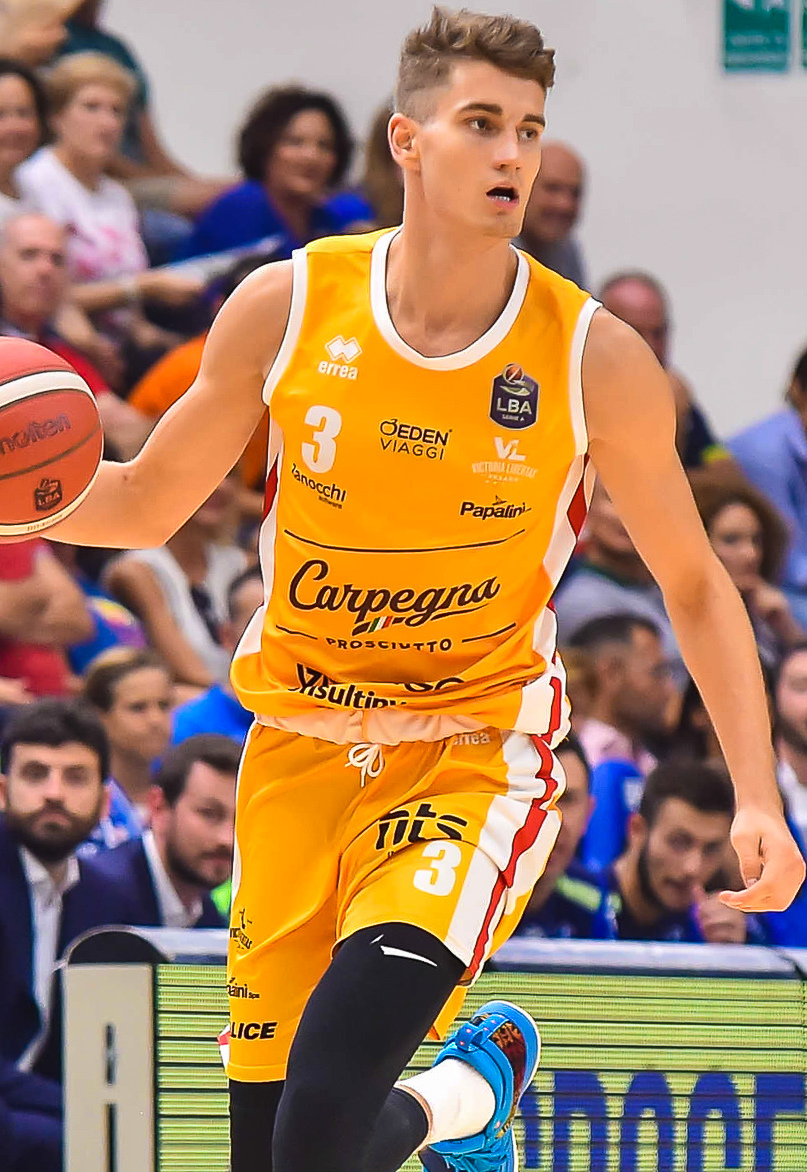 Drell